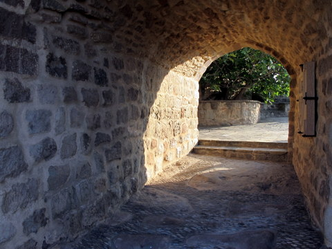 entrada al castell de Puig-reig